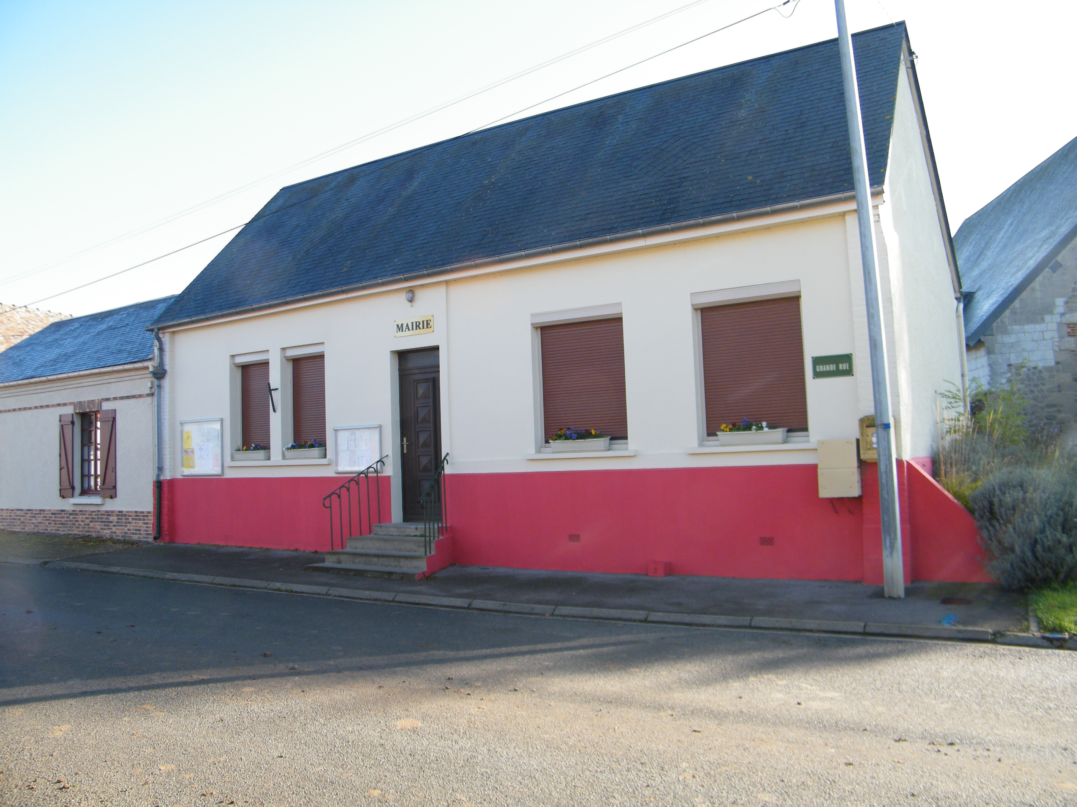 Mairie tricolore.